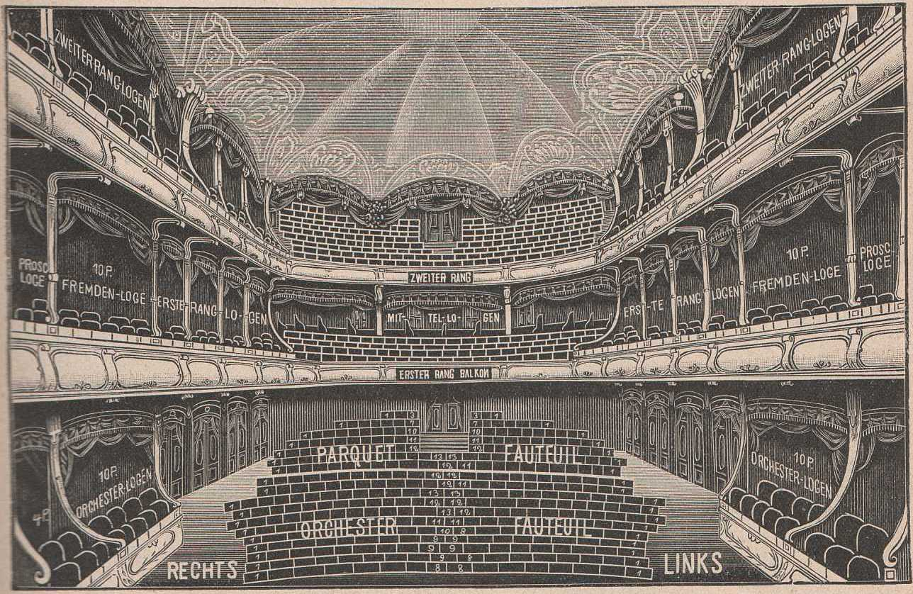 Rudolph Hertzog, Agenda 1912. Jahreskalender des Berliner Kaufhauses. Seite 107. Neues Operetten-Theater in Berlin NW, Schiffbauerdamm 25. Leinen, 224 Seiten, 19,5 x 28,5 cm